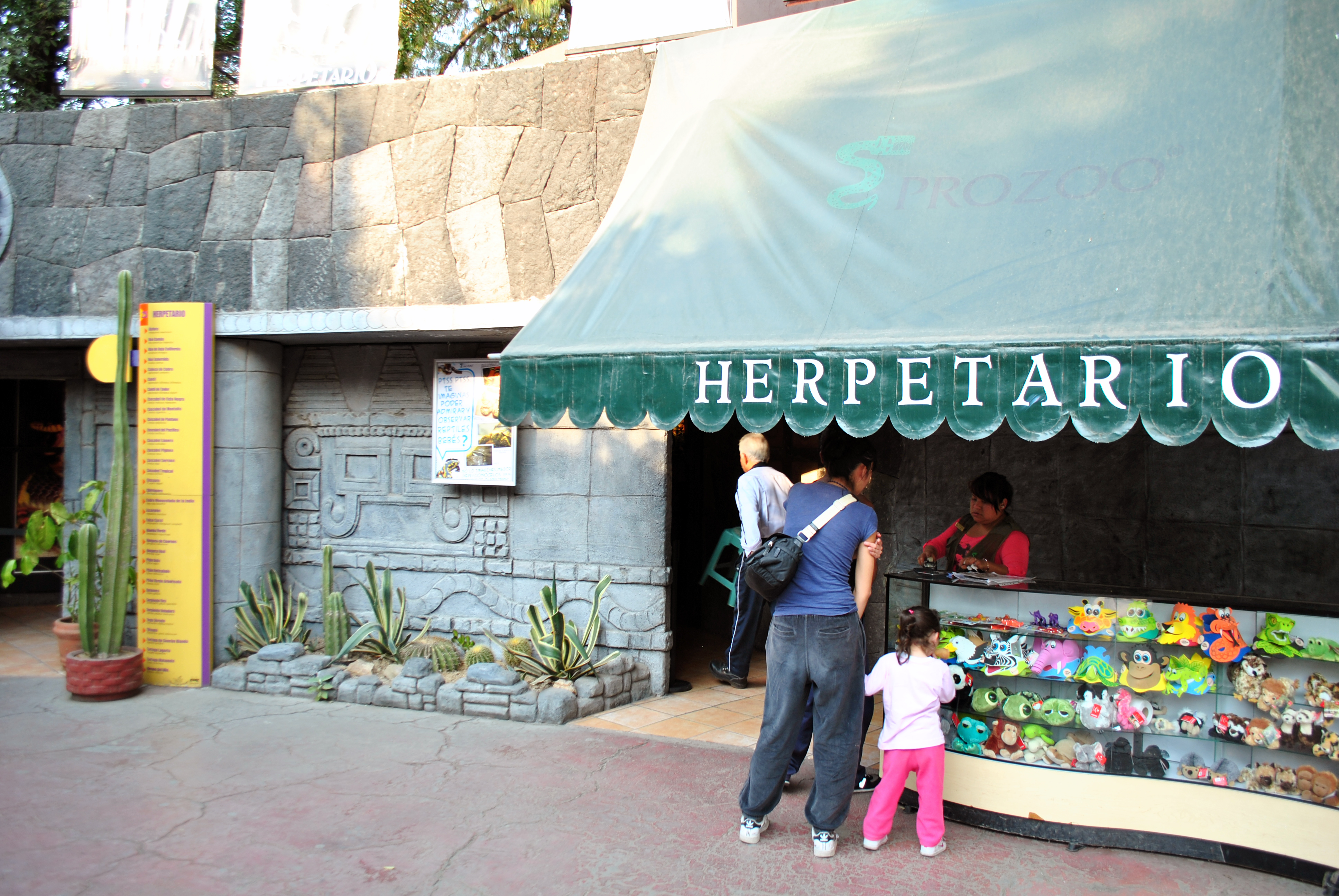 Bosque de Chapultepec primera sección